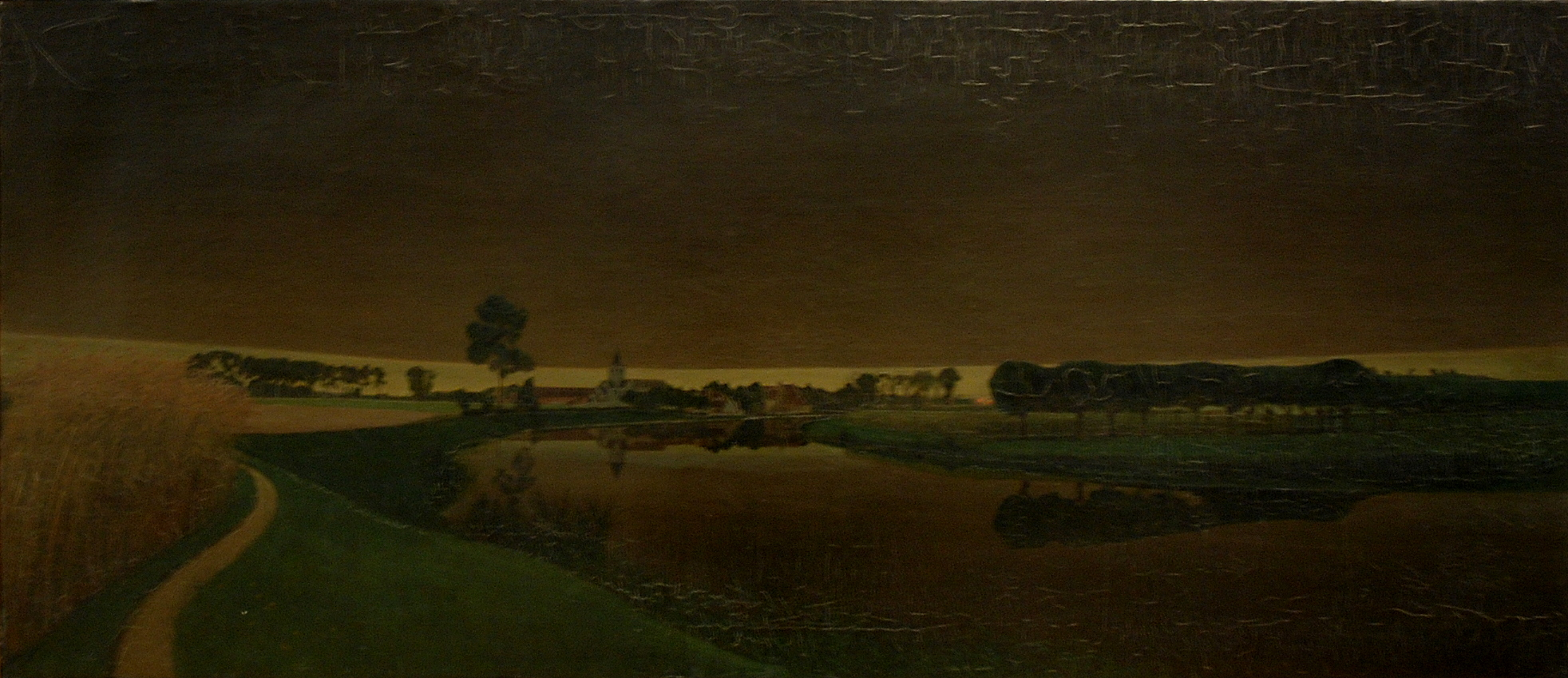 Valerius de Saedeleer - Onweer boven Sint-Martens-Latem - MSK Gent Wikidata has entry Q21679747 with data related to this item.